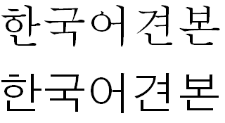 韩国语字体样本